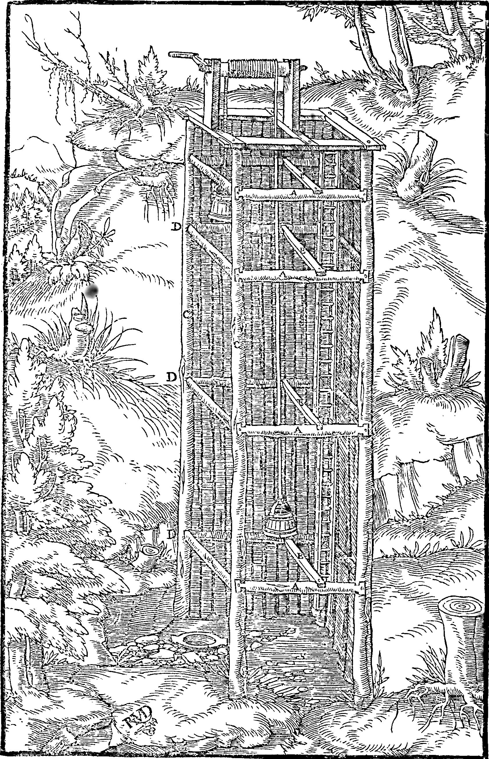 Incisione da De re metallica di Georg Agricola, Basilea, 1556